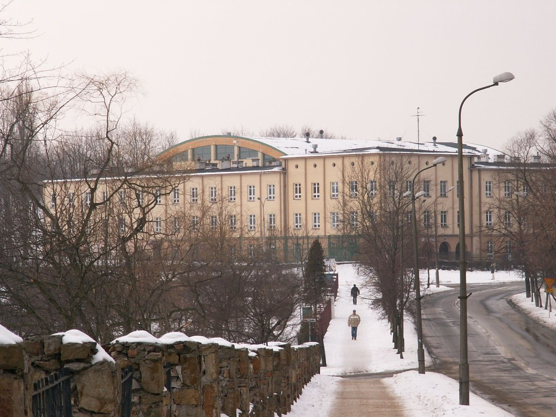 Słowacki High School in Kielce (Poland)